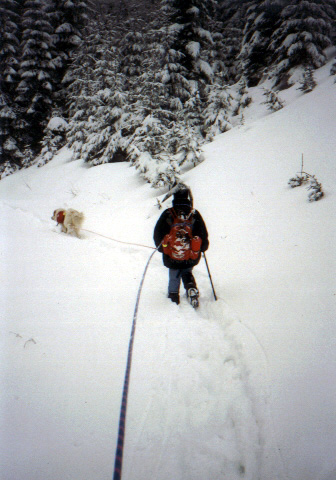 "Sicherheit im Einsatz" Hier: Seilsicherung in lawinengefährdeten Bereichen. Das Rettungshundeteam arbeitet mit anderen Teams und der Bergwacht zusammen, Hunde und Hundeführer sind über eine Seilkette verbunden…